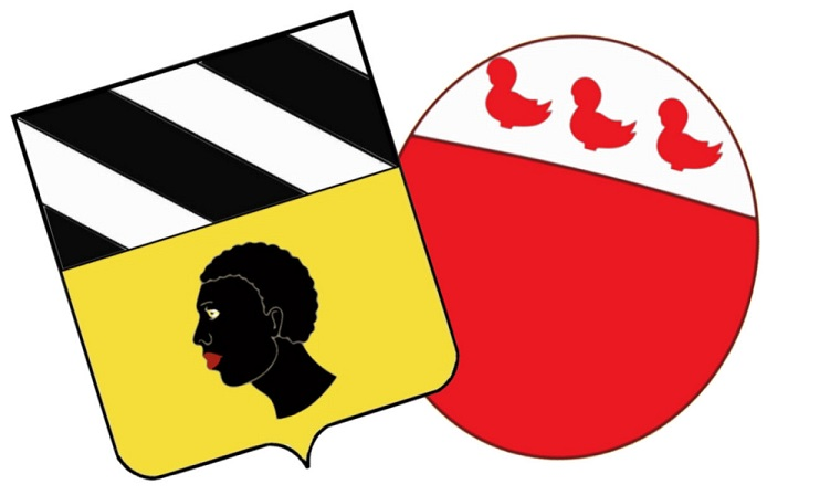 Alliance Ursel Tucher